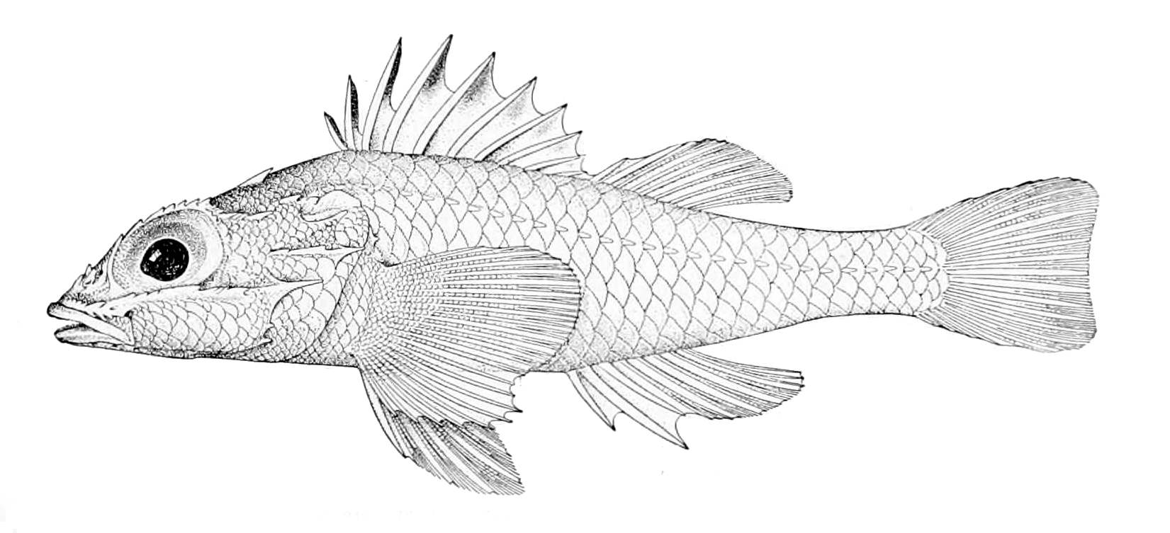 Plectrogenium nanum